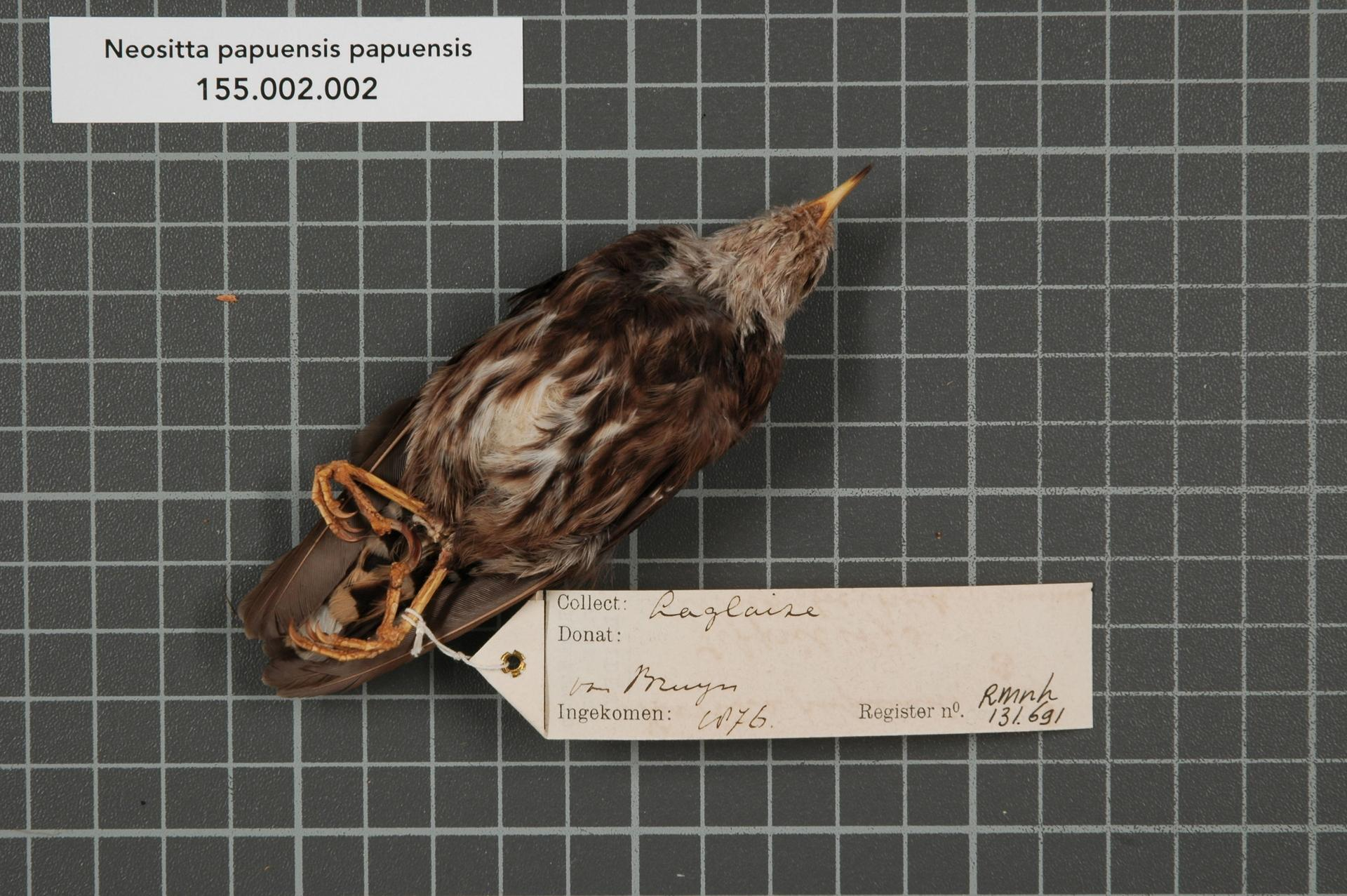 Neositta papuensis papuensis (Schlegel, 1873)